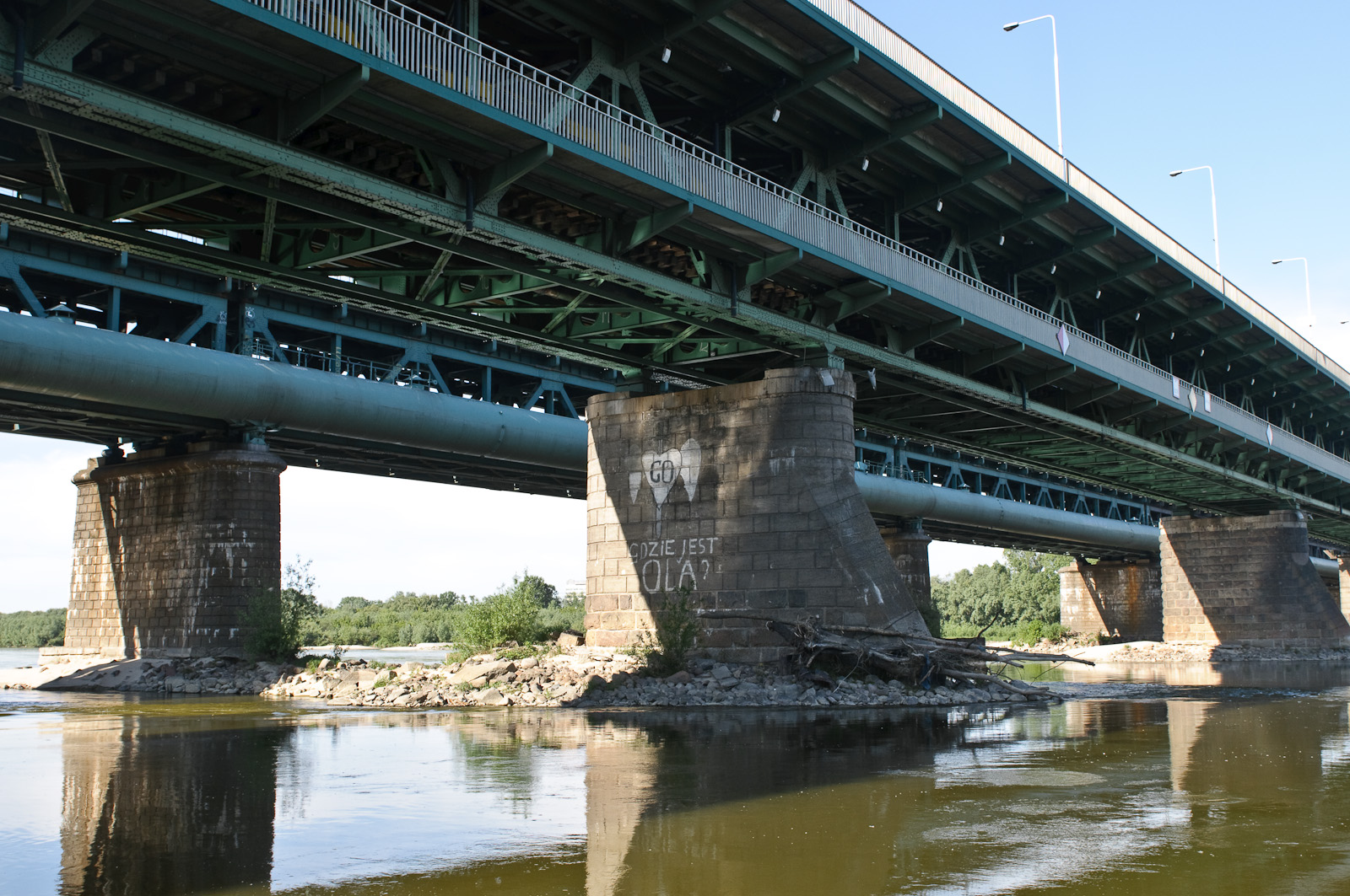 Most Gdański, Warsaw Poland